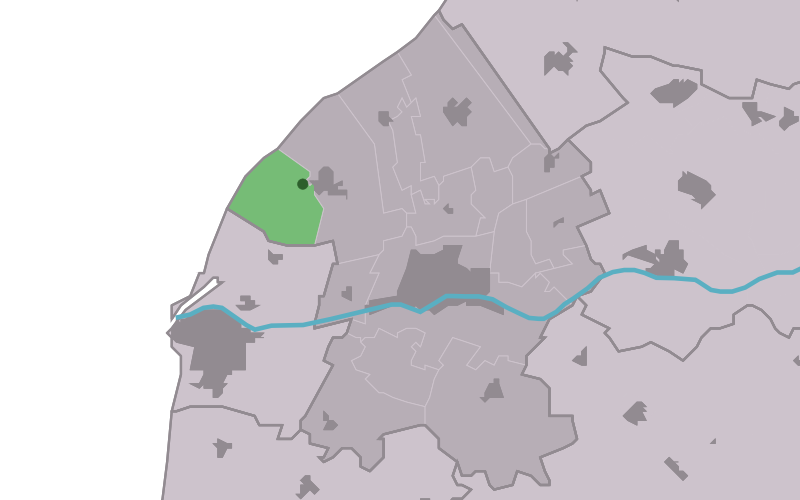 Kaartsje fan himrik fan Pitersbierrum